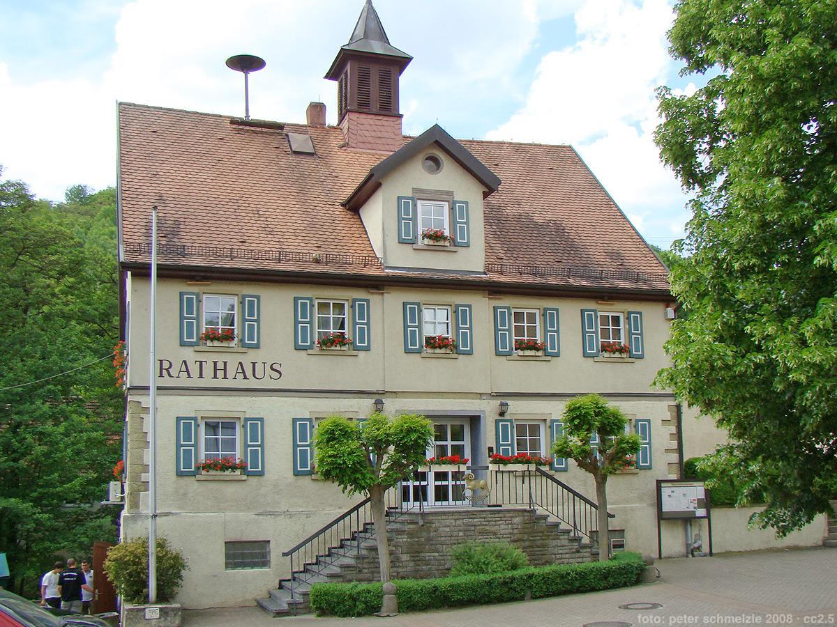 Ehemaliges Rathaus (ehem Zyllhardtsches Schloss) in Widdern